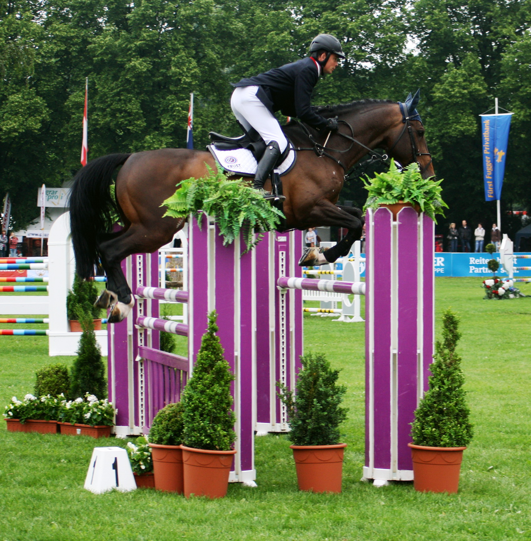 Springreiten bei der Veranstaltung Pferd International. Reiter Toni Hassmann.